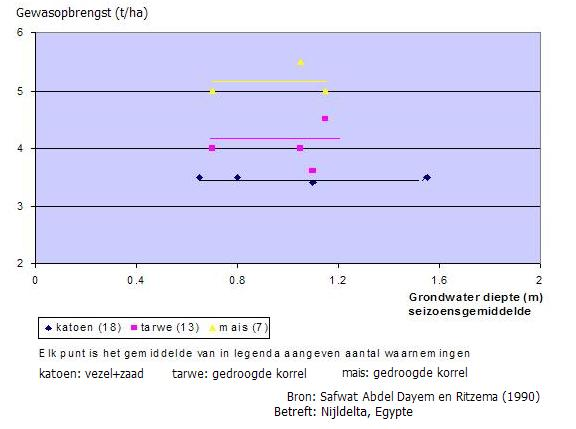 Grafiek: gewasopbrengst in Nijldelta en grondwaterstand